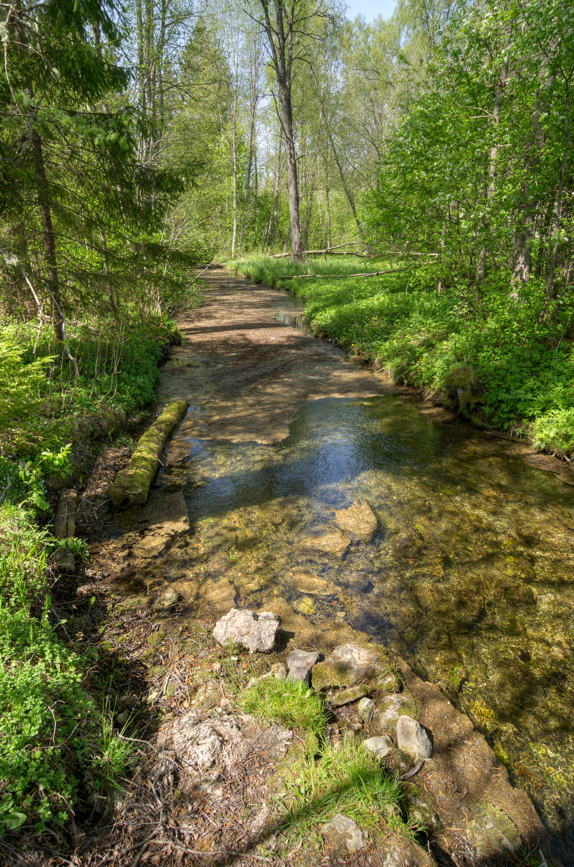 Oja Norra mõisa pargis